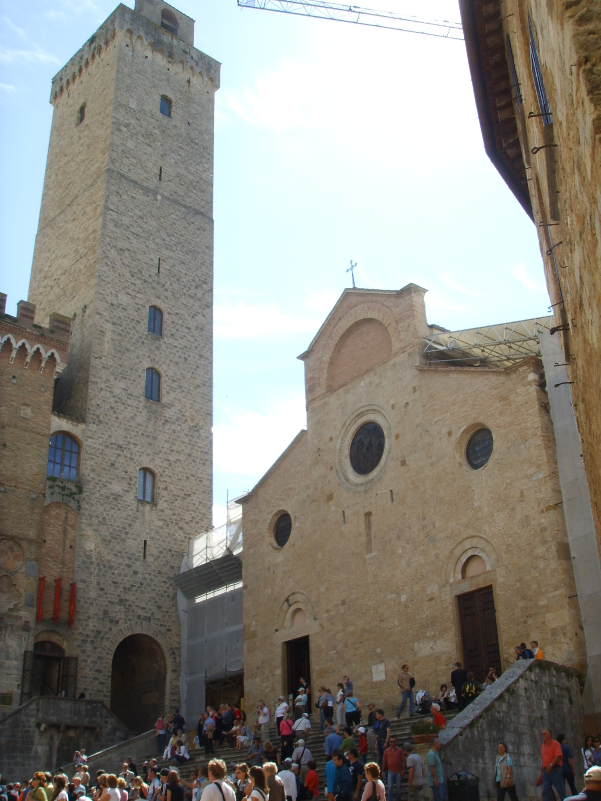 San gimignano collegiata 01 torre